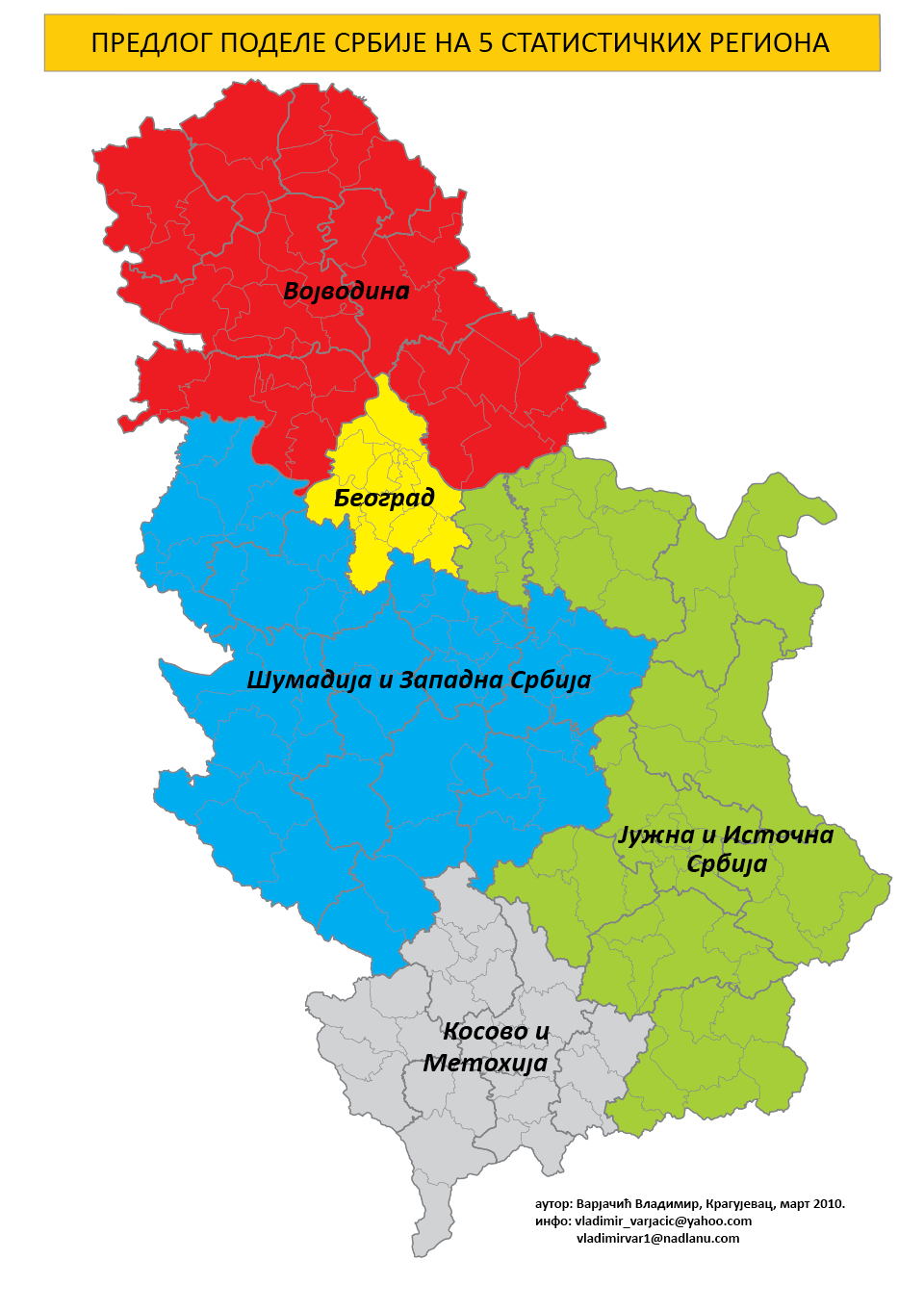 Српски (ћирилица): Предлог Статистичких региона Србије